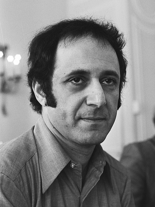 Collectie / Archief : Fotocollectie Anefo Reportage / Serie : [ onbekend ] Beschrijving : Holland Festival componist Steve Reich kop Datum : 17 juni 1976 Trefwoorden : componisten Instellingsnaam : Holland Festival Fotograaf : Peters, Hans / Anefo Auteursrechthebbende : Nationaal Archief Materiaalsoort : Negatief (zwart/wit) Nummer archiefinventaris : bekijk toegang 2.24.01.05 Bestanddeelnummer : 928-6490